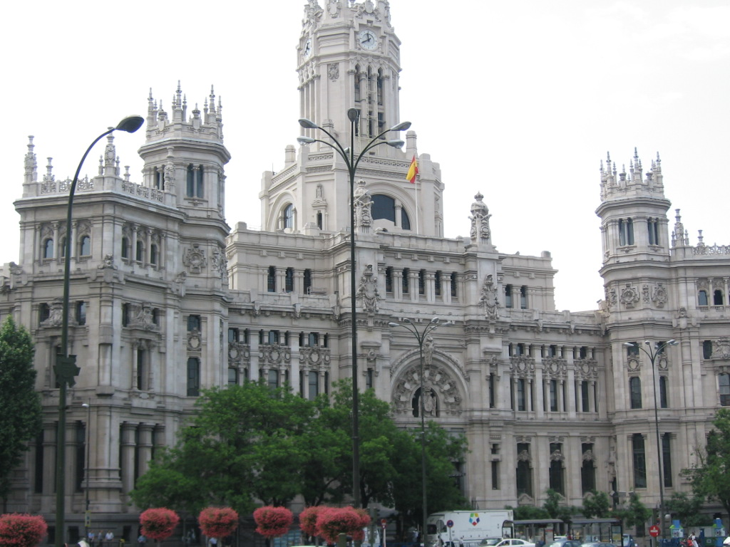 Palacio_de_Comunicaciones, Madrid